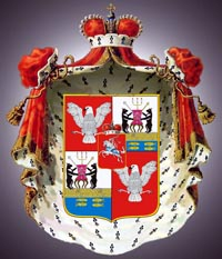 Герб рода князей Хованских